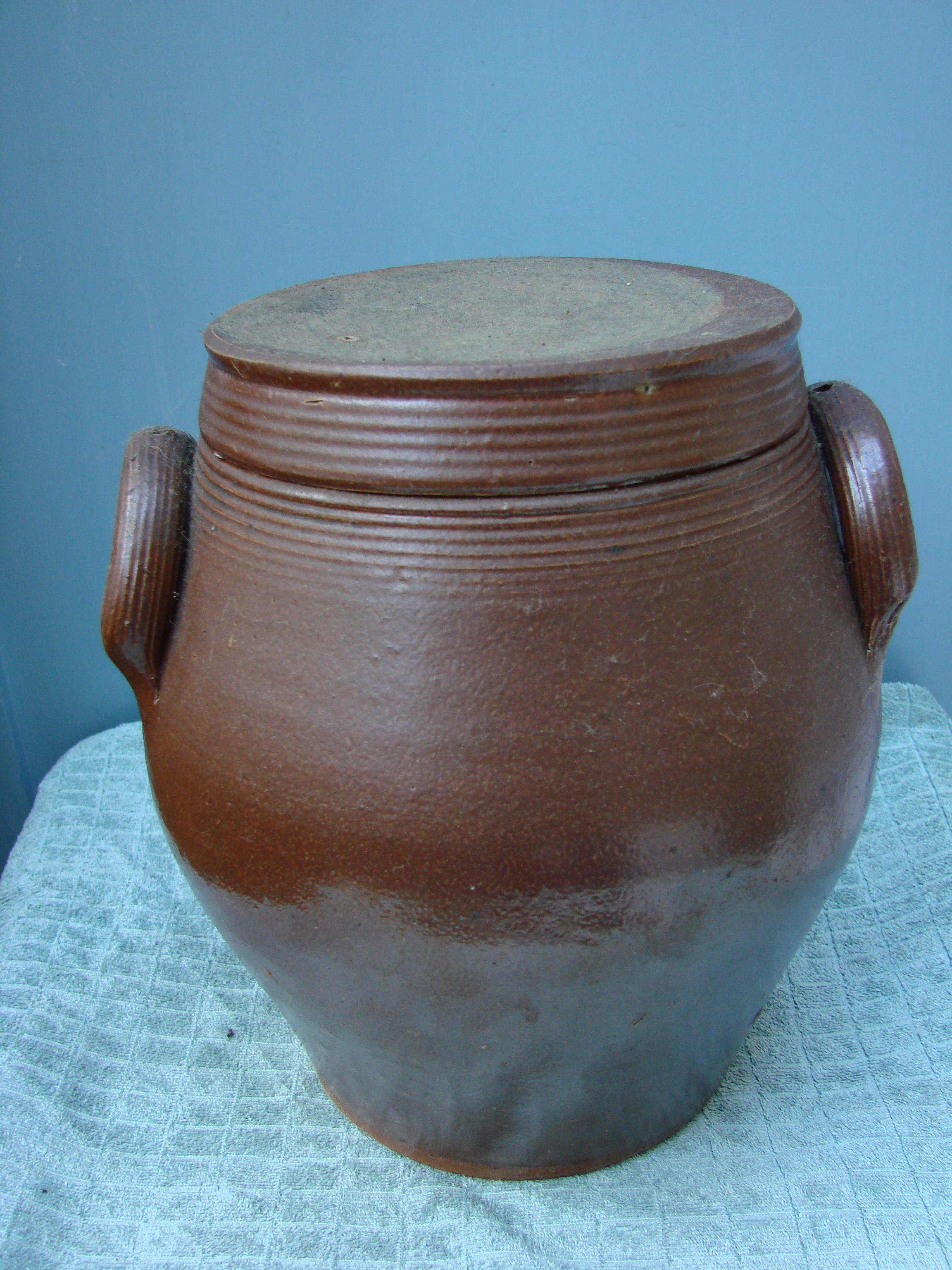 Pot en grès vernissé, origine France